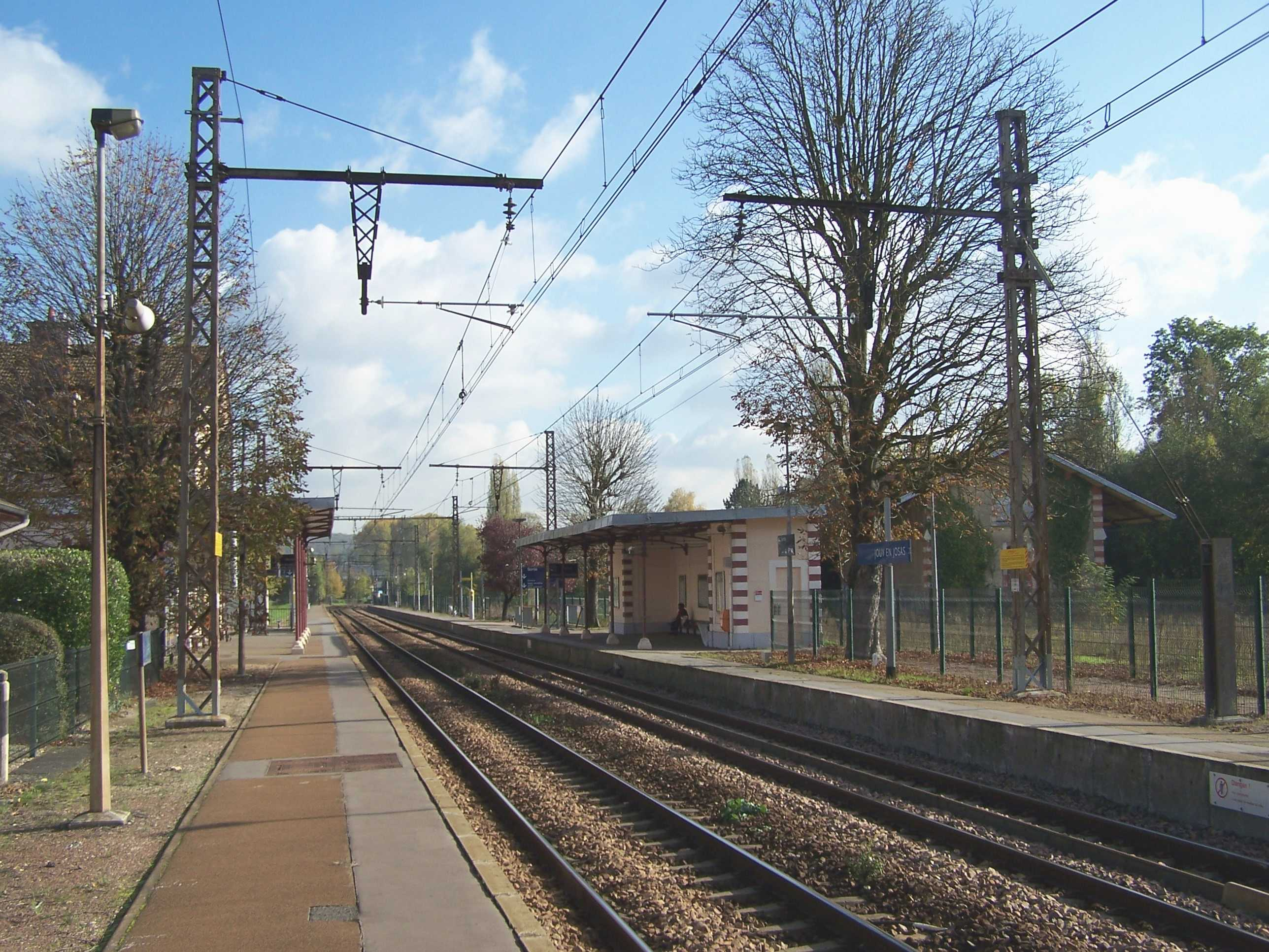 Gare de Jouy-en-Josas (Yvelines, France)